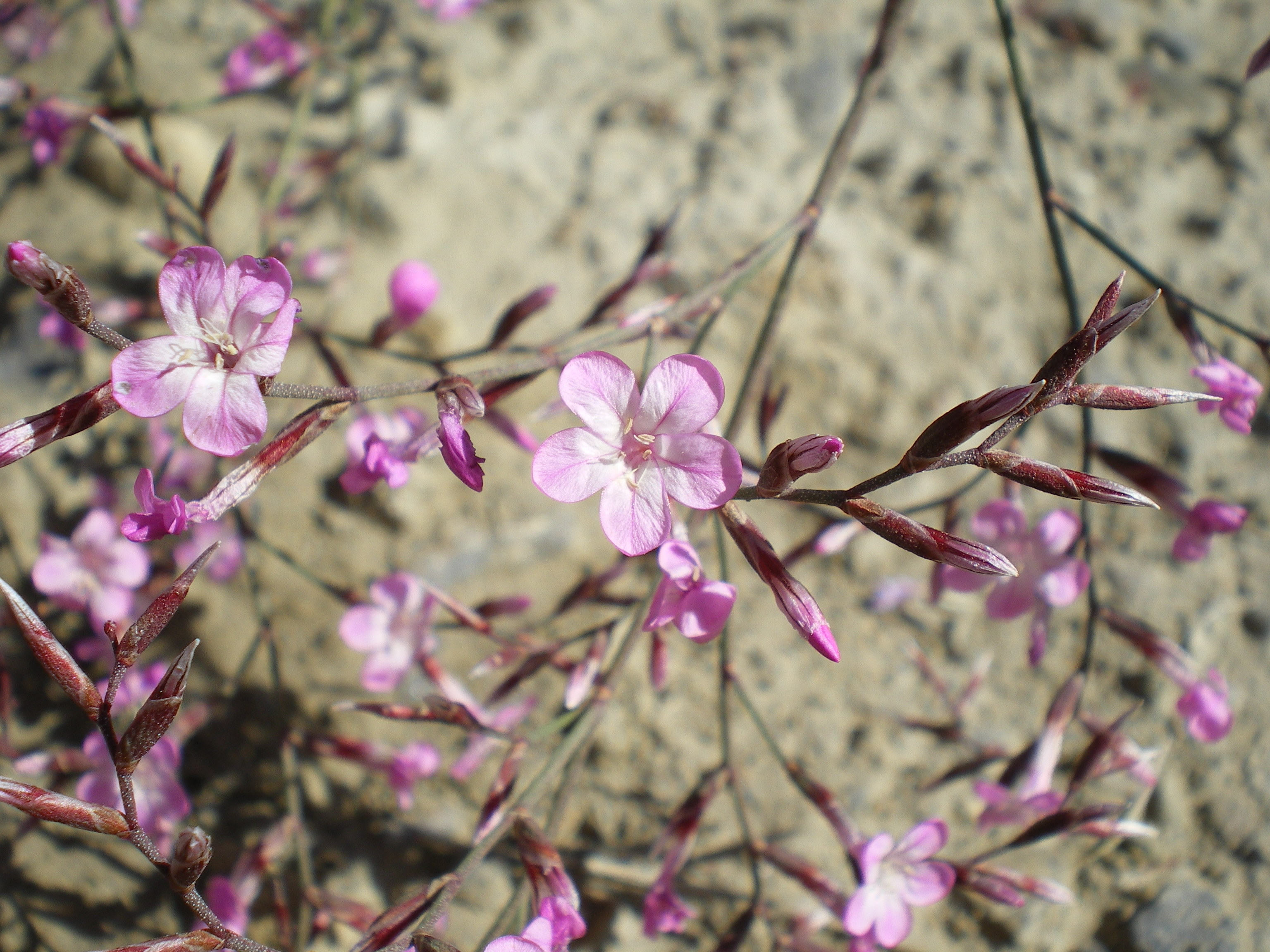 Fotografía de flores de Limonium insigne, planta de la familia de las Plumbagináceas, tomada en el subdesierto de Tabernas, provincia de Almería, España.